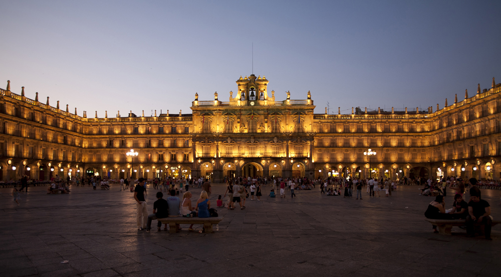 unidentified Spain